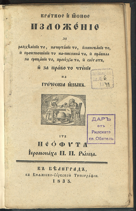 Корица на "Краткое изложение" на Неофит Рилски.